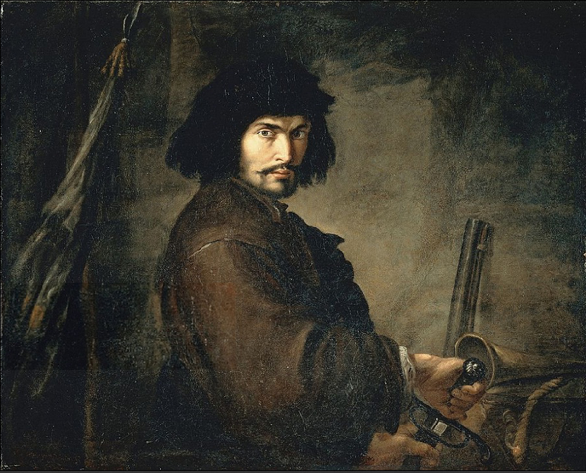 Salvator Rosa, Autoritratto in veste di guerriero, 1640-1649 (Siena, Banca del Monte dei Paschi, Collezione Chigi Saracini)